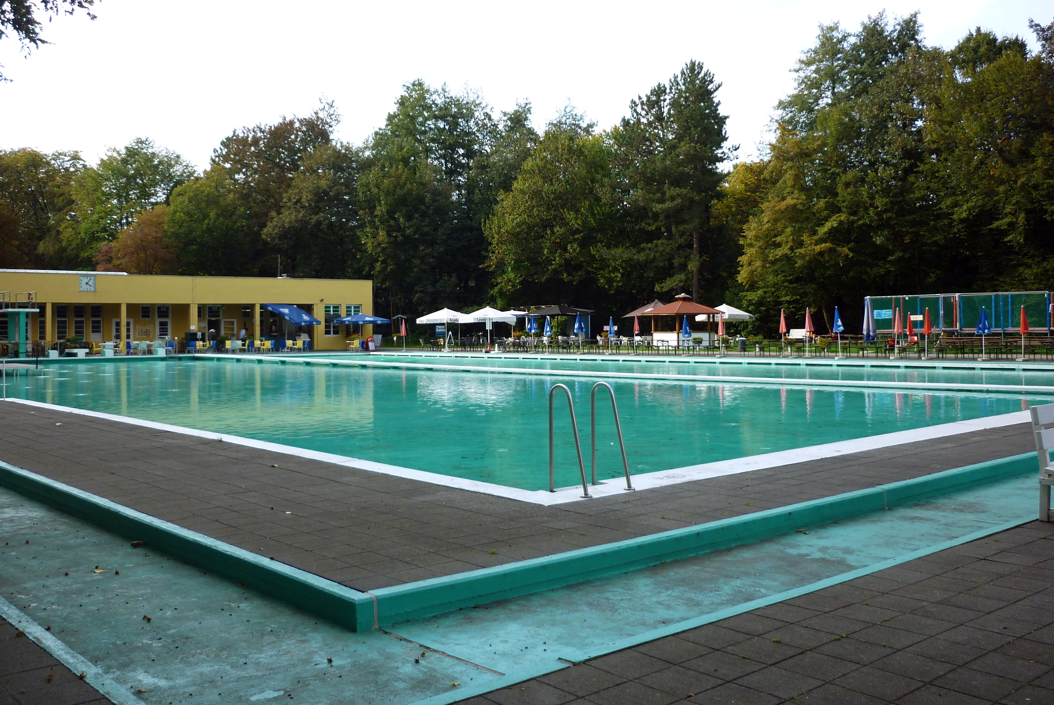 Gütersloh, Parkbad von 1929 (Denkmalschutz). Heute Luftbad mit einer Wassertiefe von ca. 20 cm.